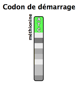 codon, démarrage, initiateur, génétique, chromosone